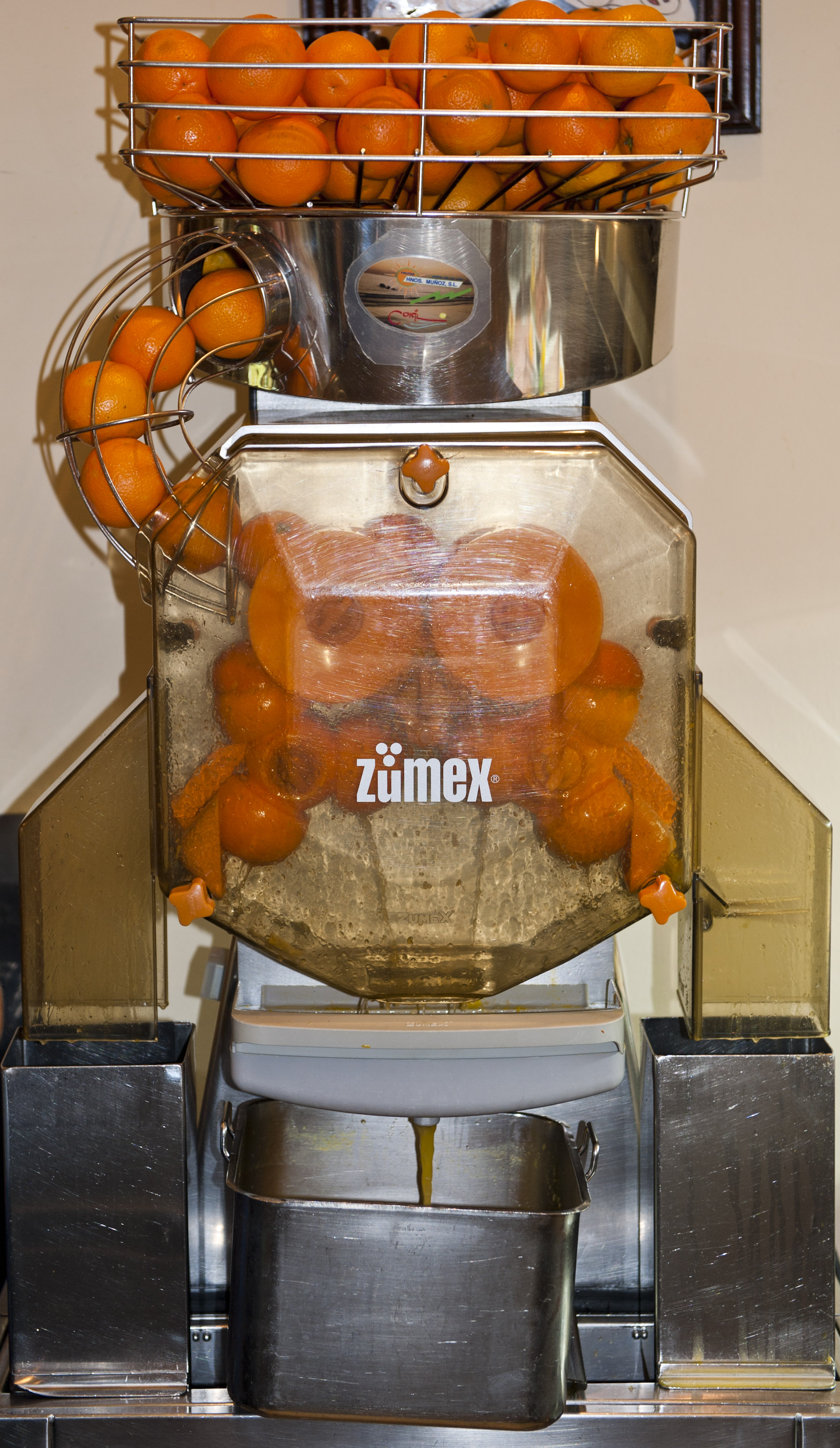 Juice squeezer